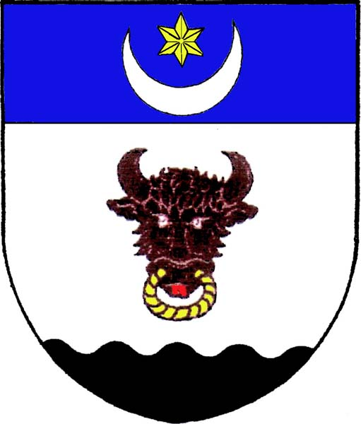 Znak obce Černvír